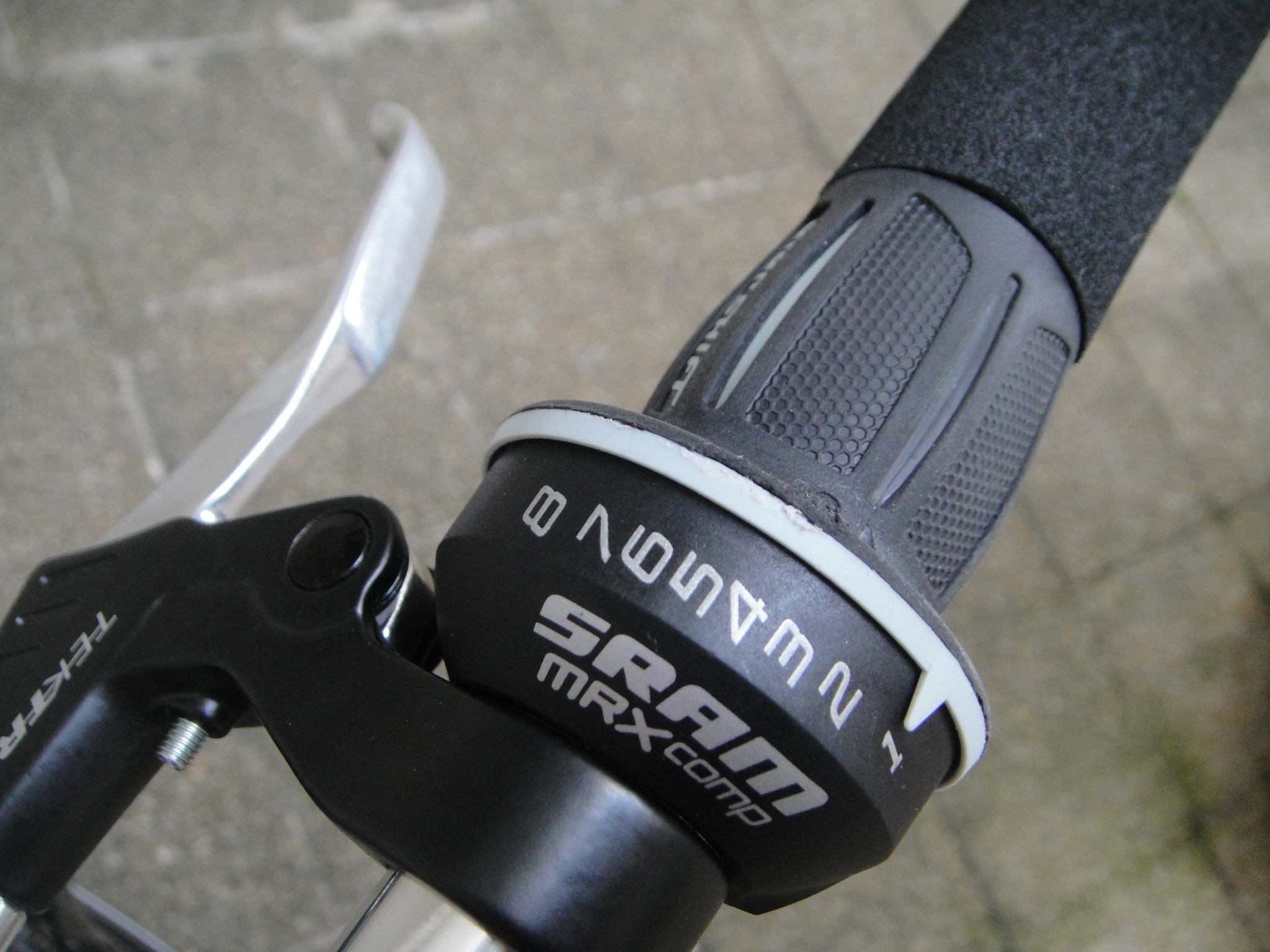 スラム社製8段変速グリップシフト